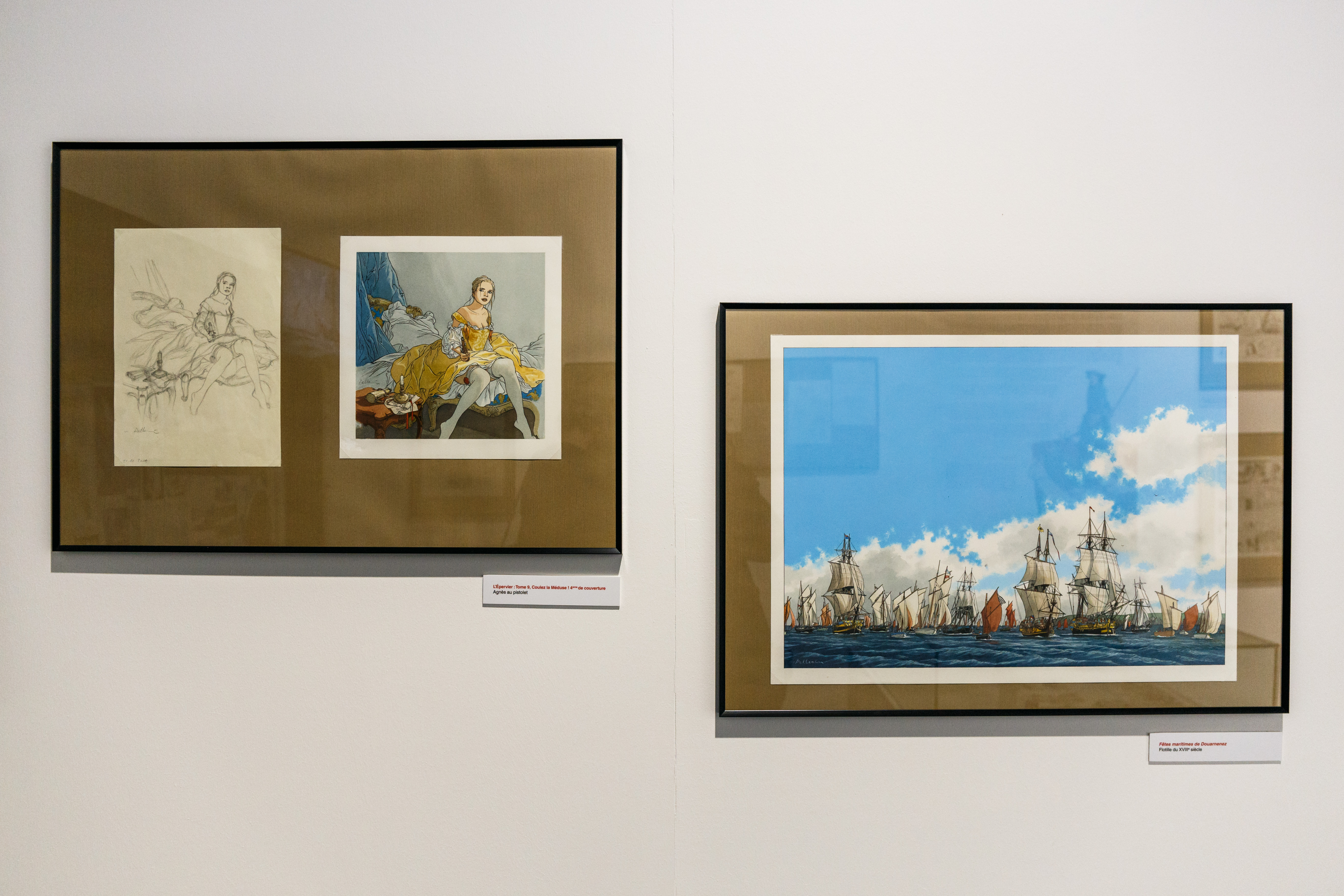 Exposition L’Épervier, BD de Patrice Pellerin, à la médiathèque François-Mitterrand Les Capucins à Brest, entre janvier et avril 2017.